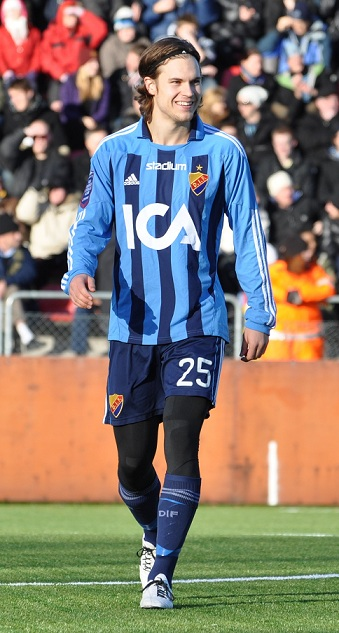 Sebastian Rajalakso